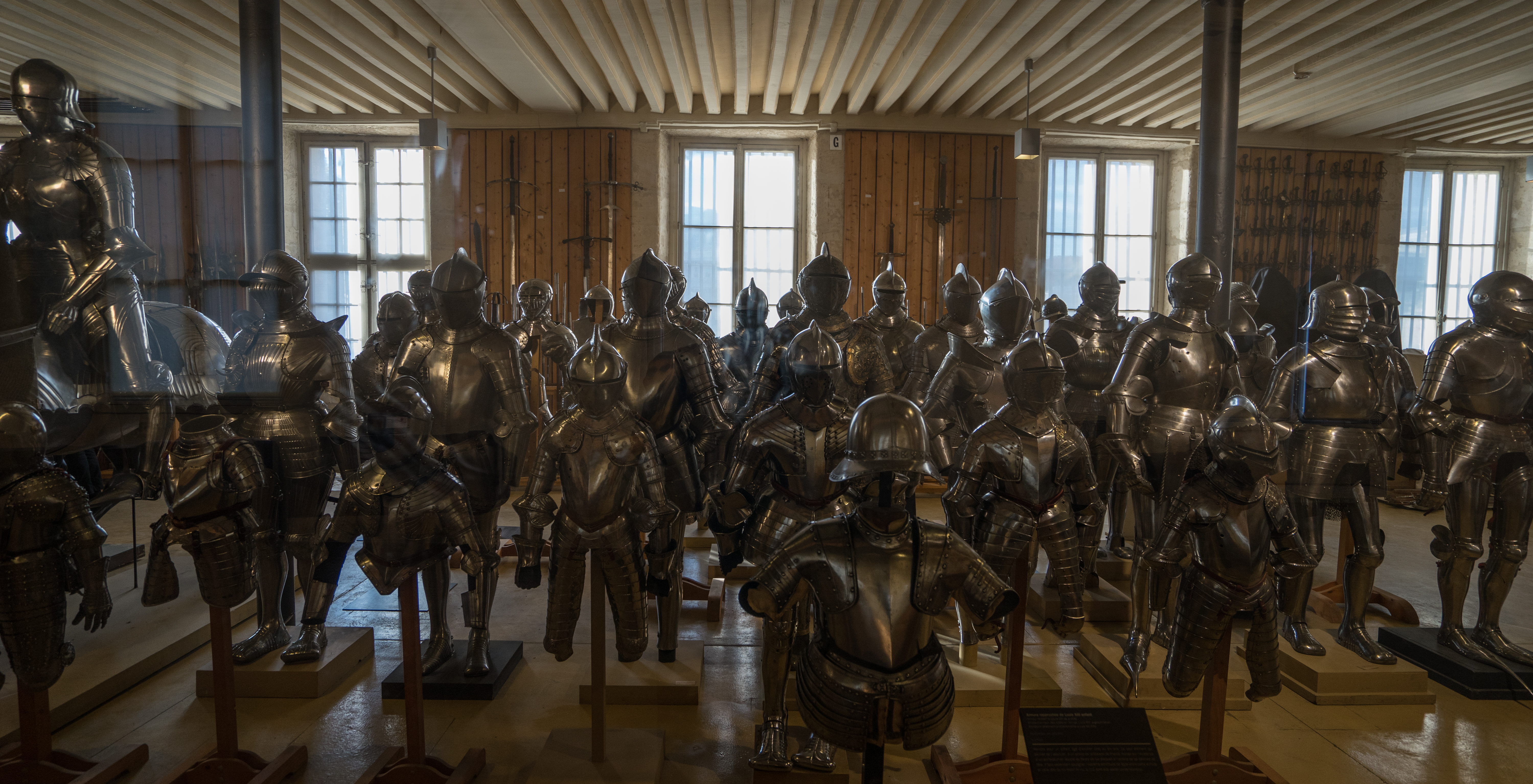 Armours, Musée de l'Armée, Paris.